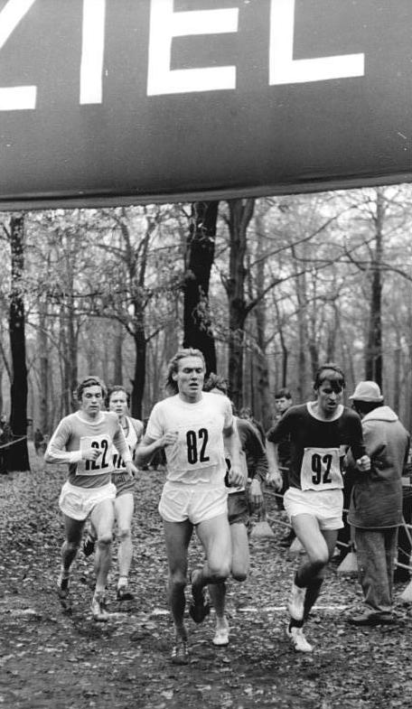 Ralf Pönitzsch, Werner Schildhauer ADN-ZB Rehfeld-18-11-79-str-Berlin: Willi-Sänger-Gedenklauf- Im Hauptlauf über 8 km drückten Ralf Pönitzsch (Nr. 82) und Werner Schildhauer (92) in einer starken Spitzengruppe von Beginn auf das Tempo. Pönitzsch gewann diesen Lauf klar, Schildhauer wurde Dritter.